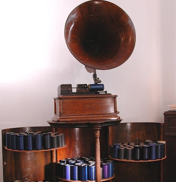 Edison Opera USA 1911